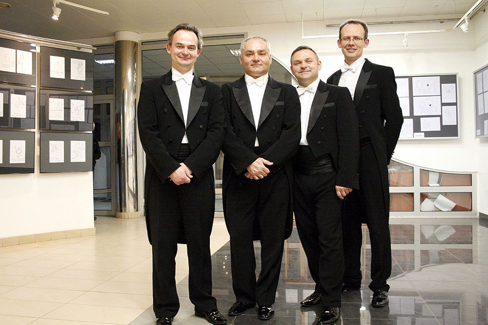 Grupa MoCarta (2016)